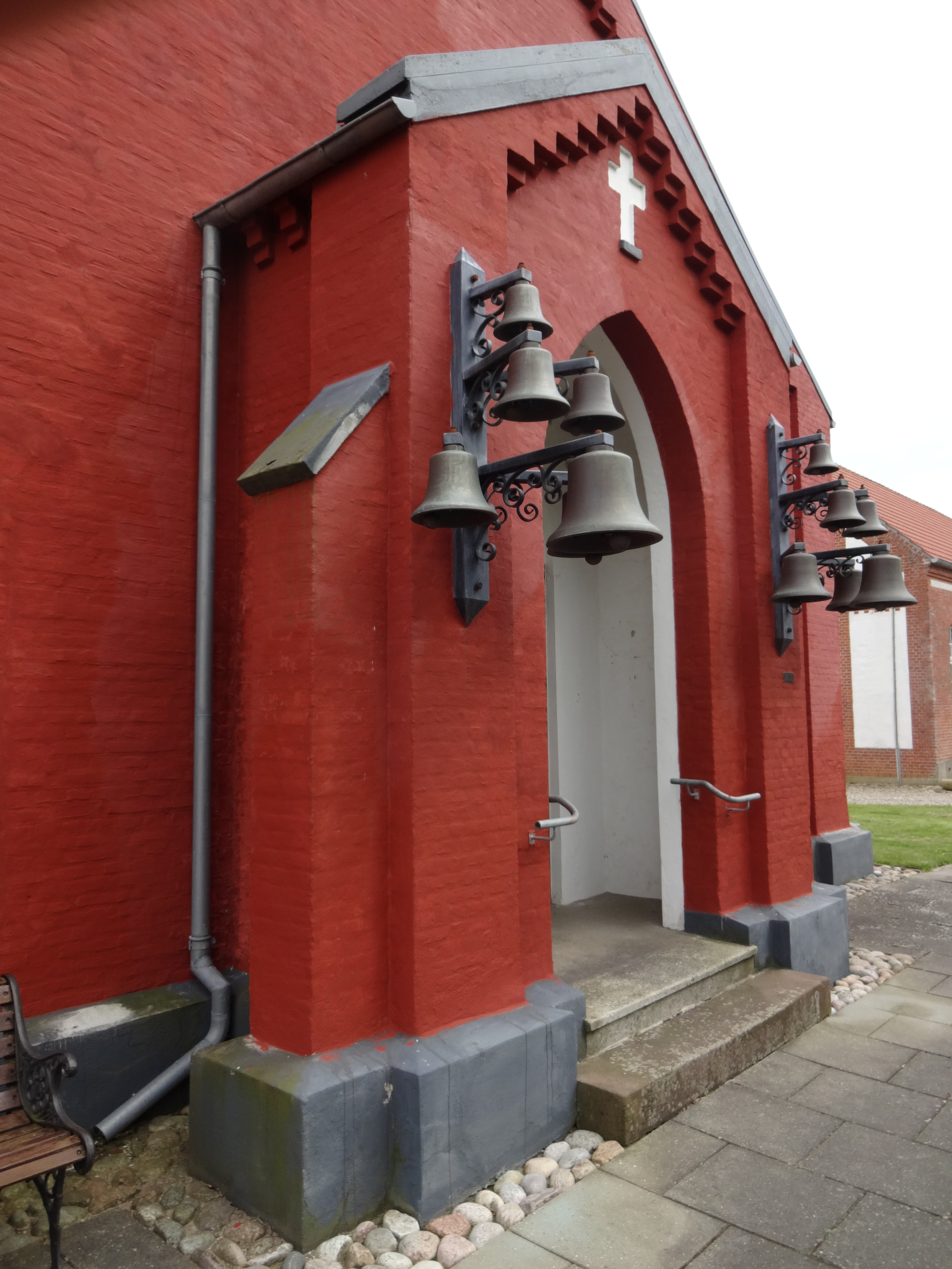 Over Lert Kirke